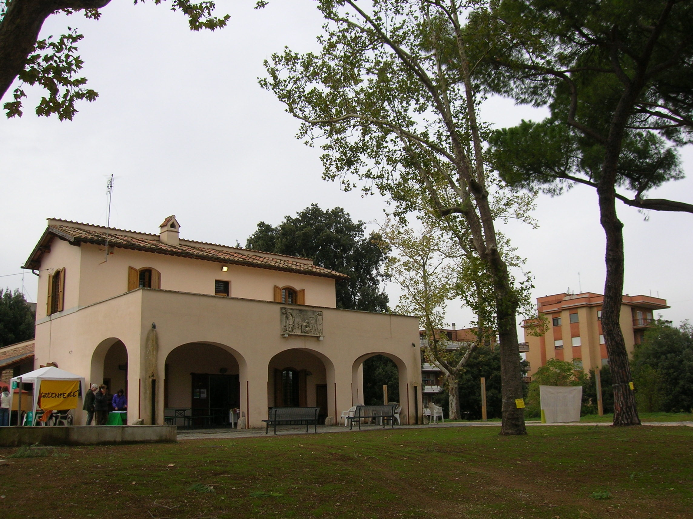 Casale nel Parco urbano di Aguzzano, Roma, Lazio, Italia.